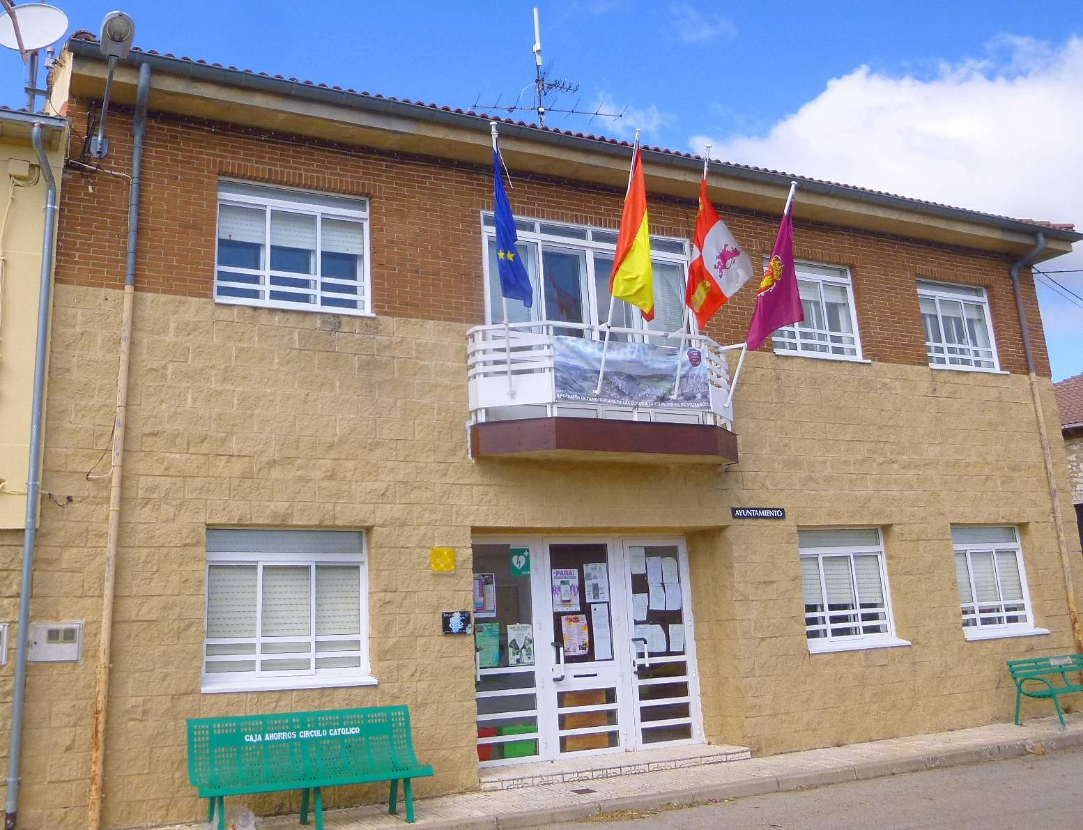 Ayuntamiento de Sargentes de la Lora (Burgos)